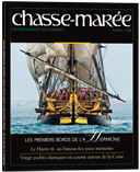 Couverture du Chasse-Marée consacré à L'Hermione